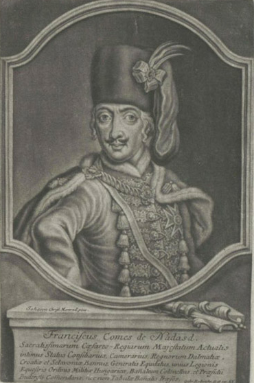 Надасти